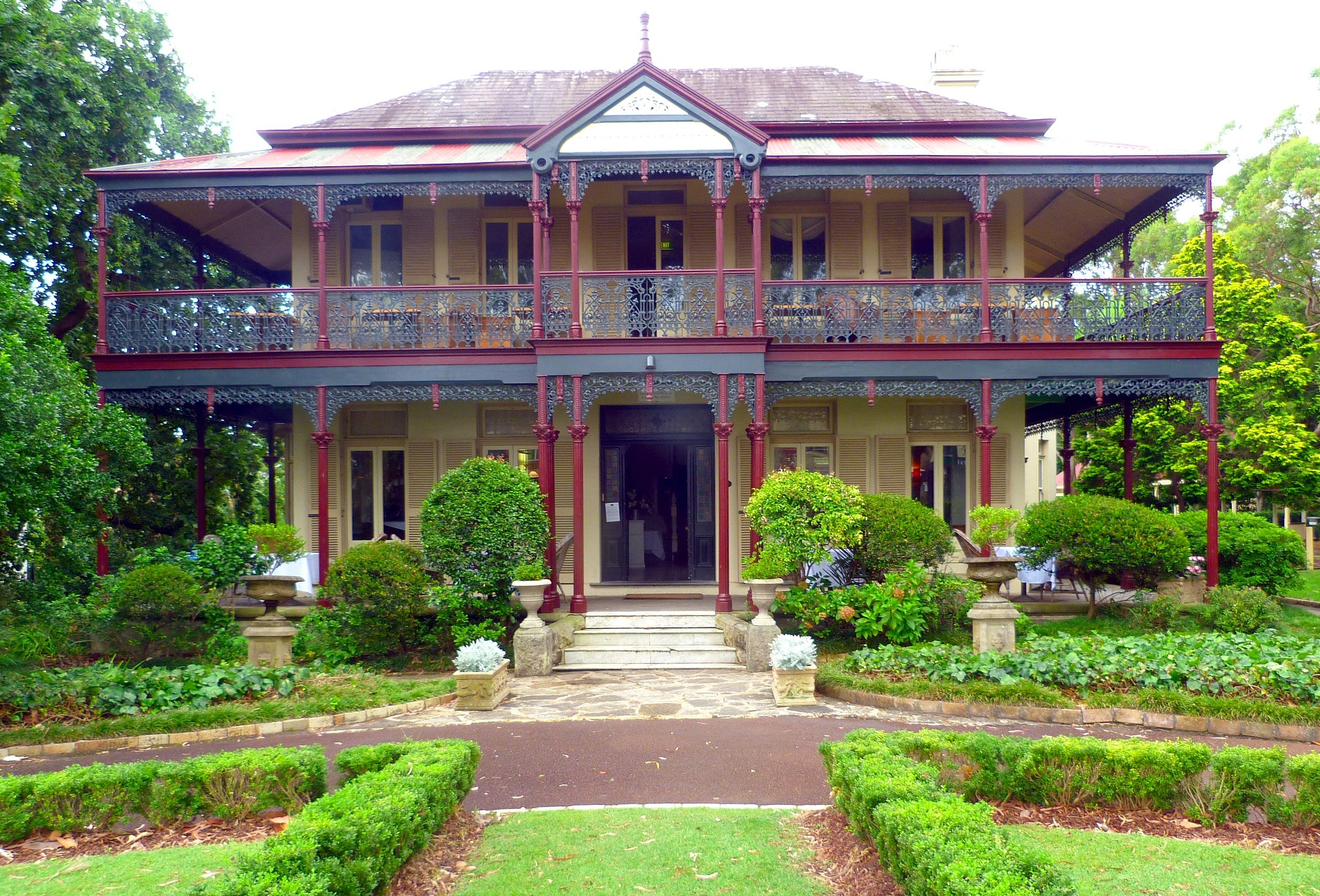 Boronia, Mosman, Sydney